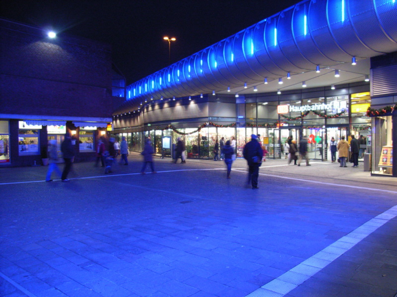 Beschreibung: Der nächtliche Gelsenkirchener Hauptbahnhof vom Taxistand aus gesehen. Description: Gelsenkirchen Mainstation at night. Quelle/Source: Fotografiert am 23. Dezember 2006 Fotograf: Marc Schuelper